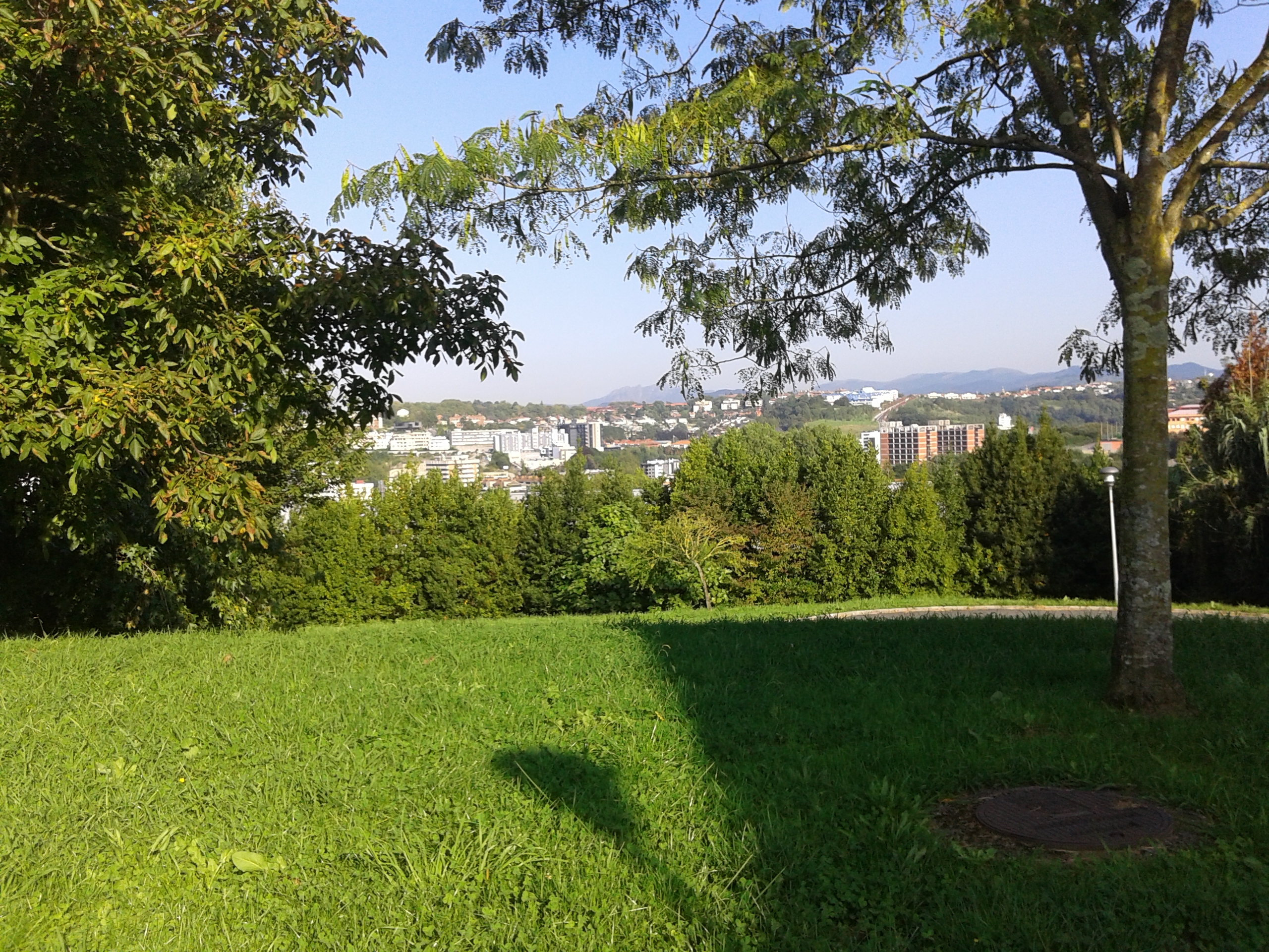 Koldo Mitxelena parkea Ibaeta gainean.